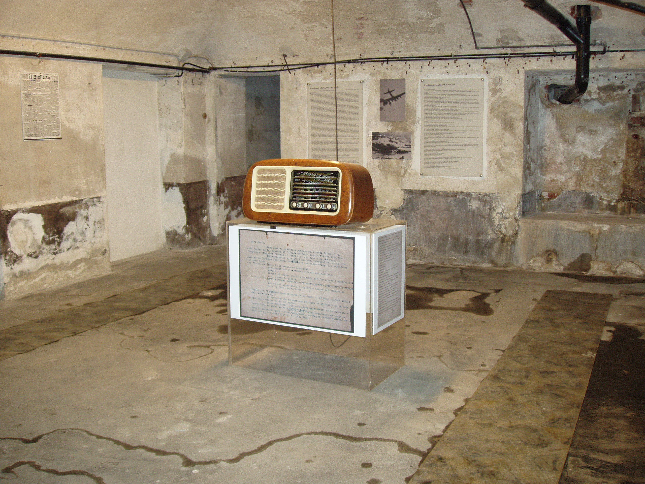 Biella, Villa Schneider: Luogo della memoria - Radio Baita